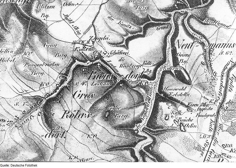 Original image description from the Deutsche Fotothek Liebstadt-Großröhrsdorf-Biensdorf. Oberreit, Sect. Dresden, 1821/22